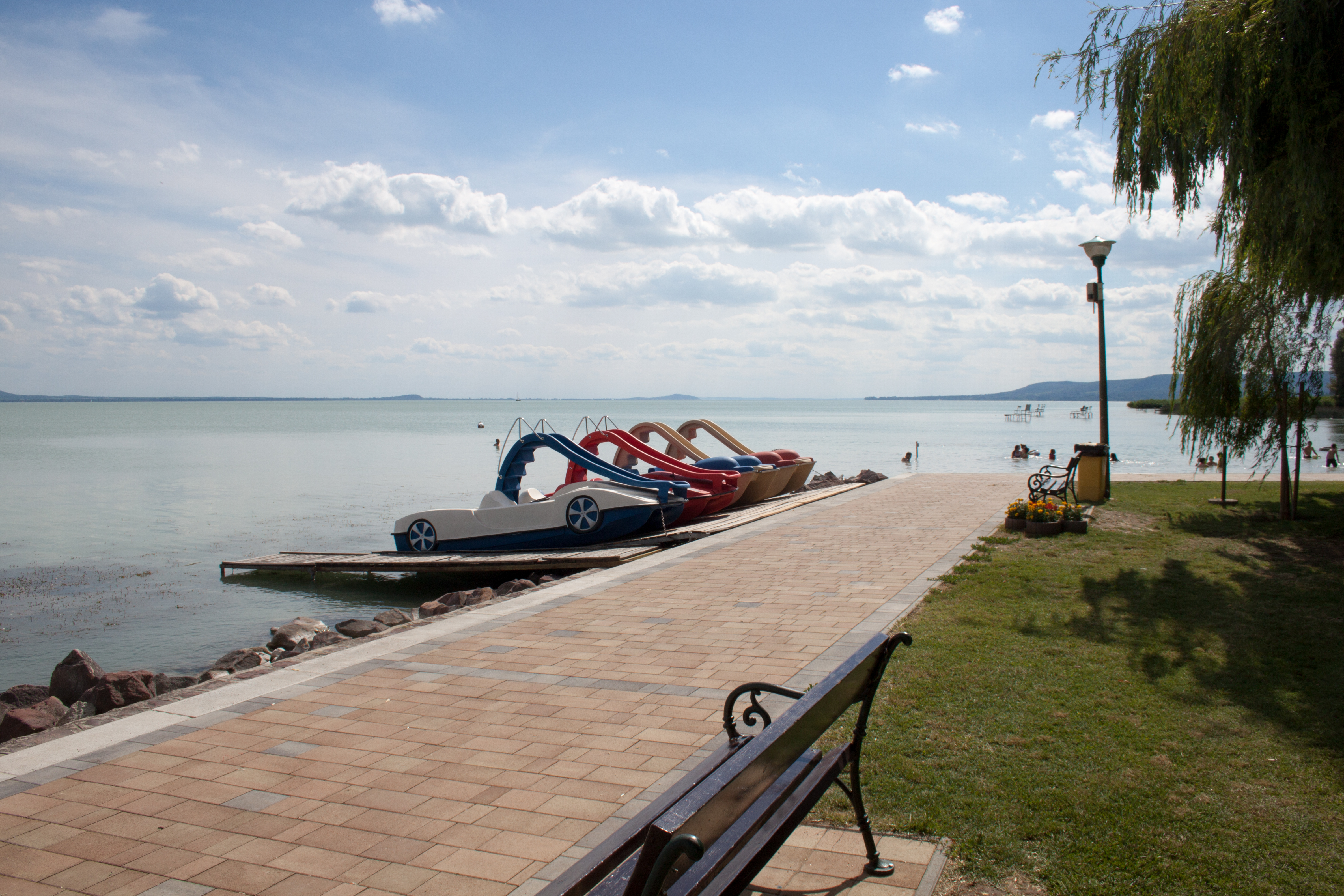 Balatonakali, beach